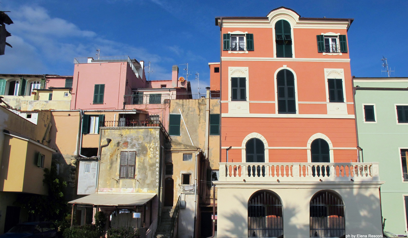 Lungomare, vecchie case dei pescatori in una giornata d'estate del 2012